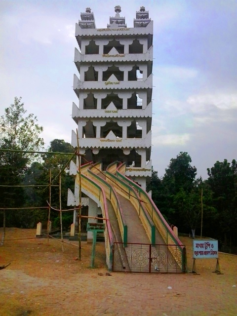 অষ্টমার্গ, রাজবন বিহার, রাঙামাটি